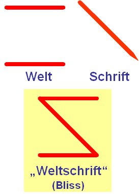 Beispiel einer Pasigrafie, die Bliss-Symbole von Charles K. Bliss